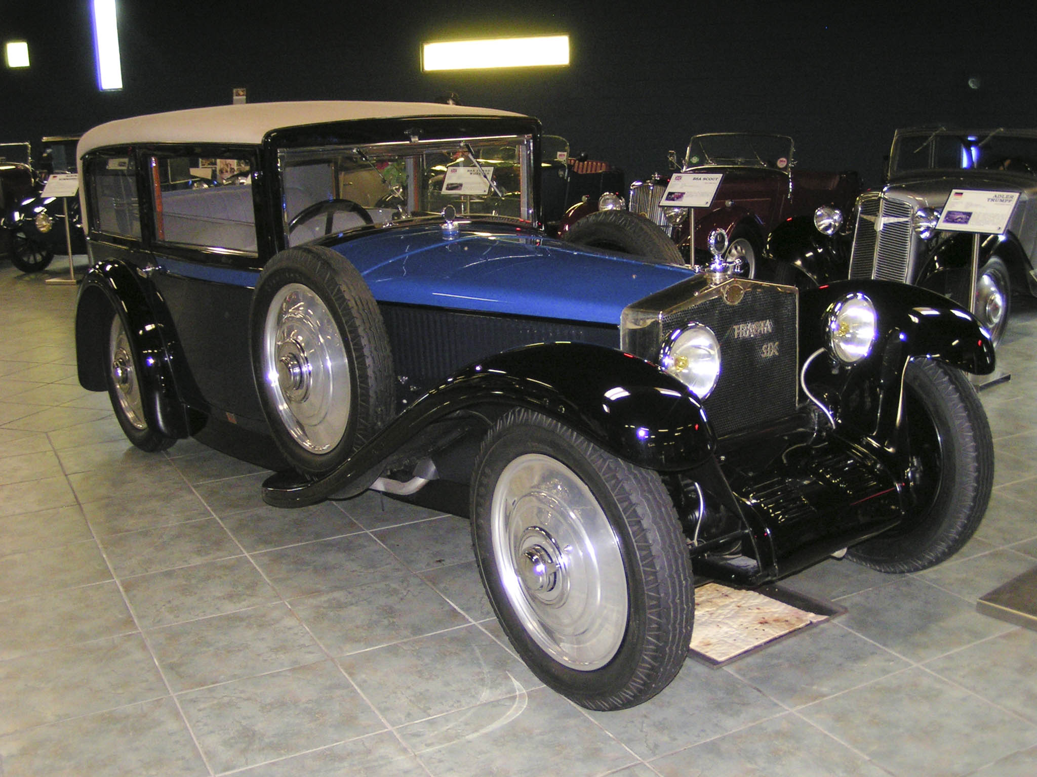 1930 Tracta E1930 Tracta E